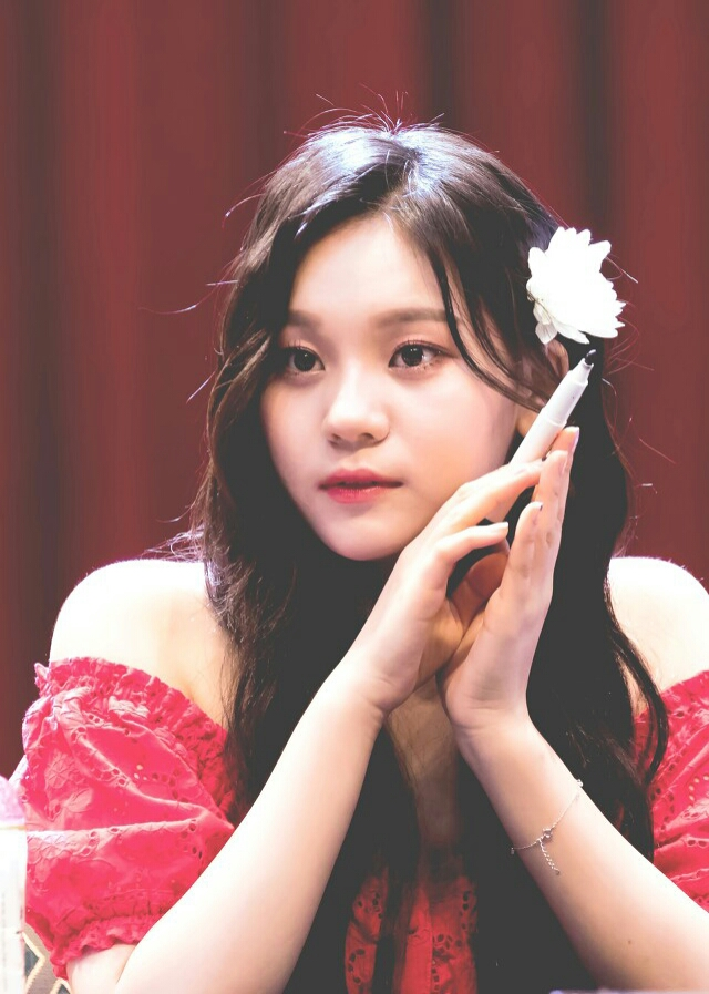 Português do Brasil: Kim Umji no Noryangjin Fansign em 21 de julho de 2018